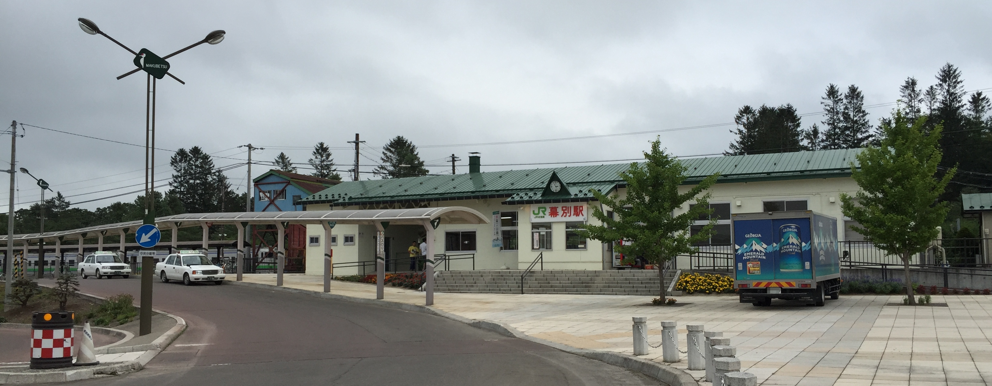 幕別駅駅舎